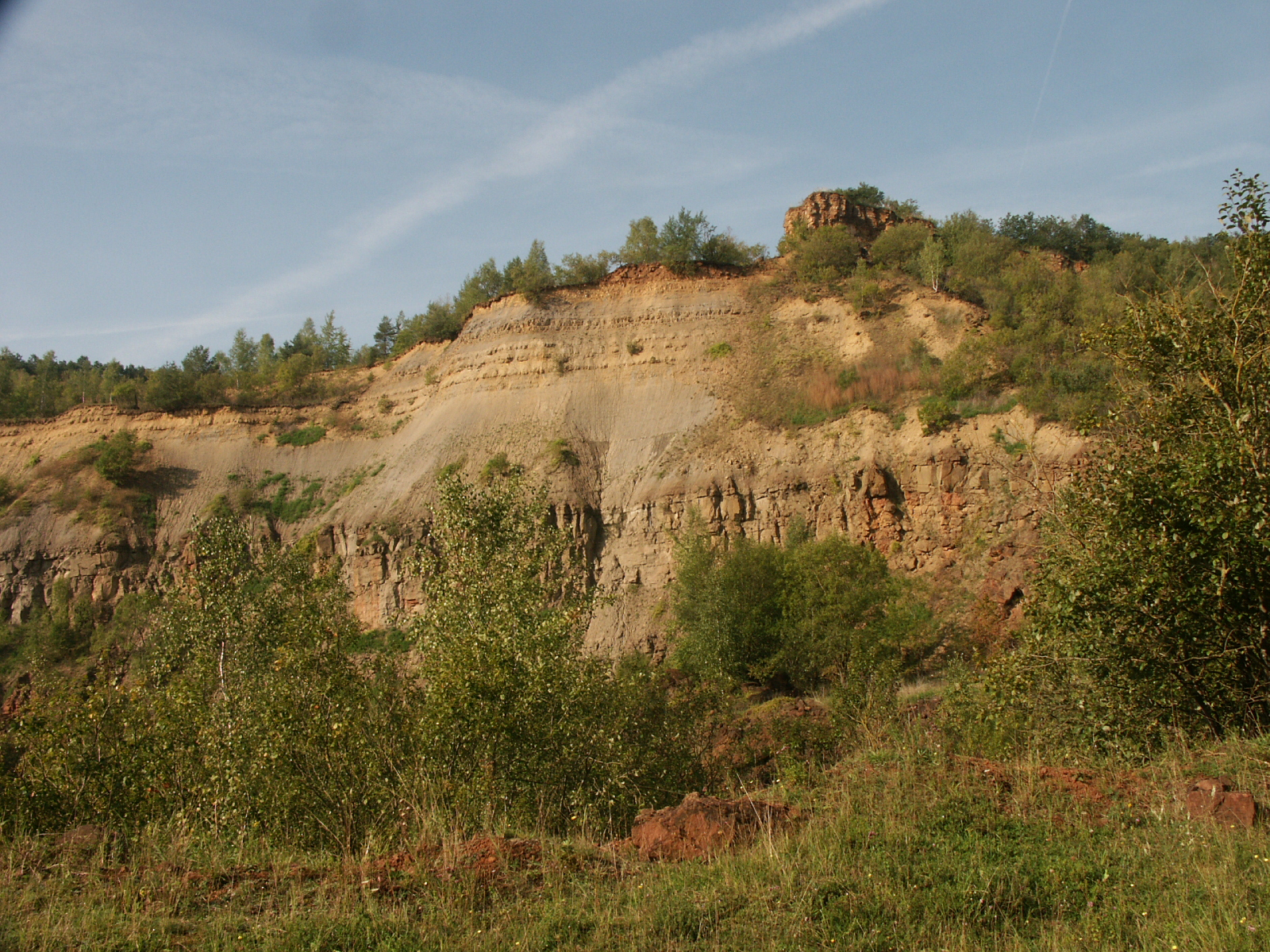 D'Natur hëllt sëch alles erëm. Hei wuar fréier "Tagebau".